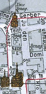 Mapa okolic ulicy Żydowskiej z 1907